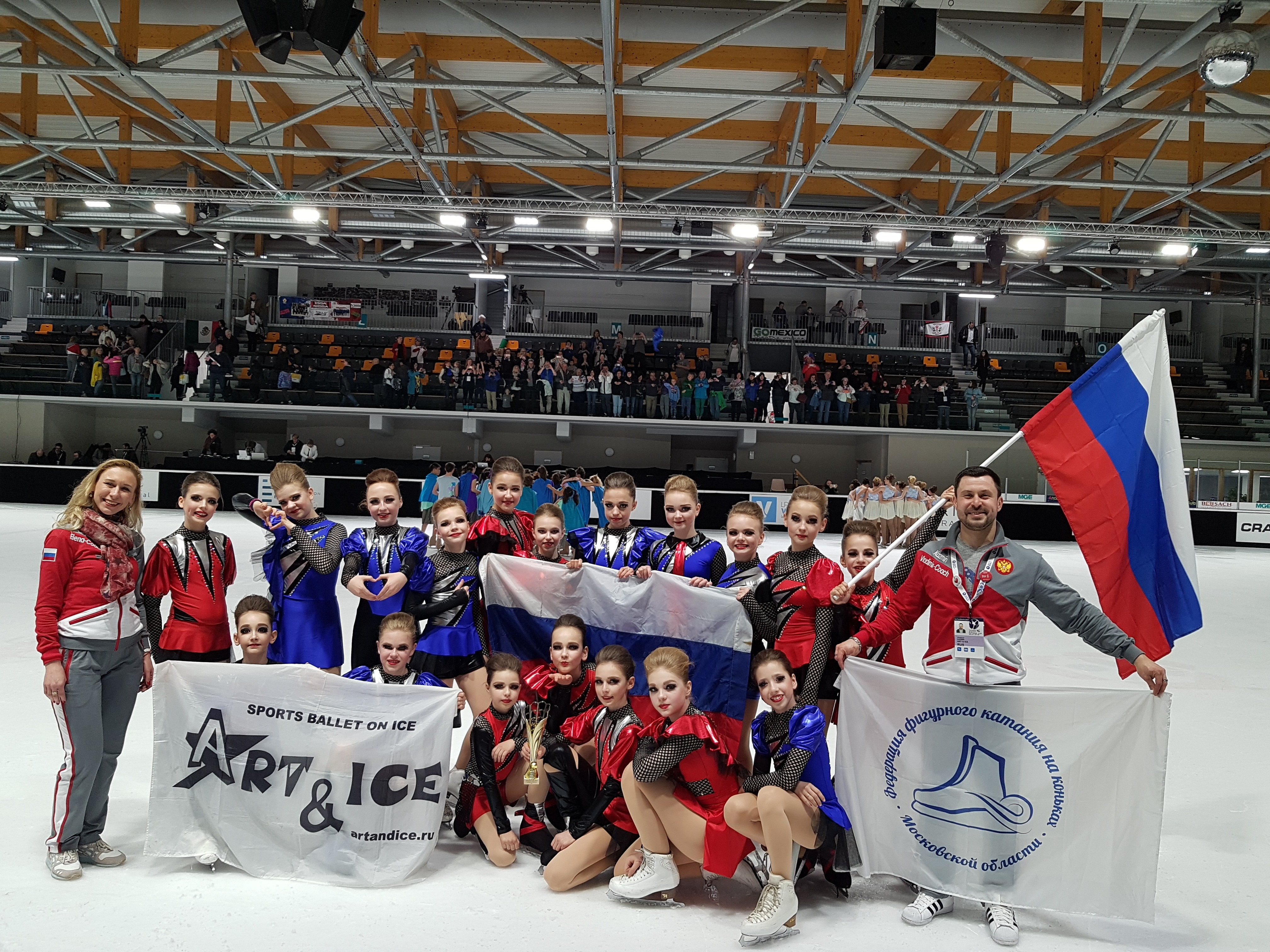 Art & Ice бронзовый призер Nationals'Cup2019 Epinal France